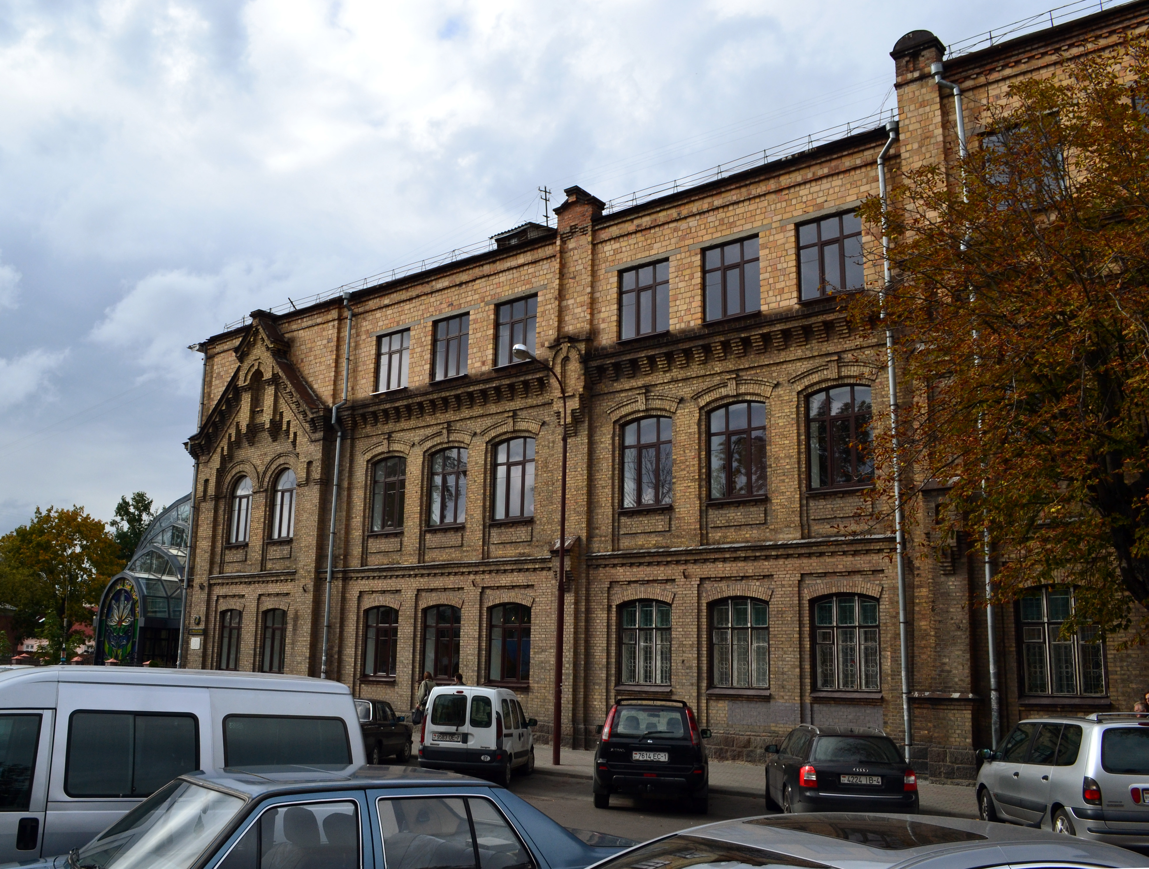 Беларуская (тарашкевіца): Гістарычны цэнтар м. Берасьця: будынкі і збудаваньні, пляніровачная структура, ляндшафт і культурны пляст. This is a photo of Belarusian heritage monument. Reference number: 112Е000002 ( WLM)